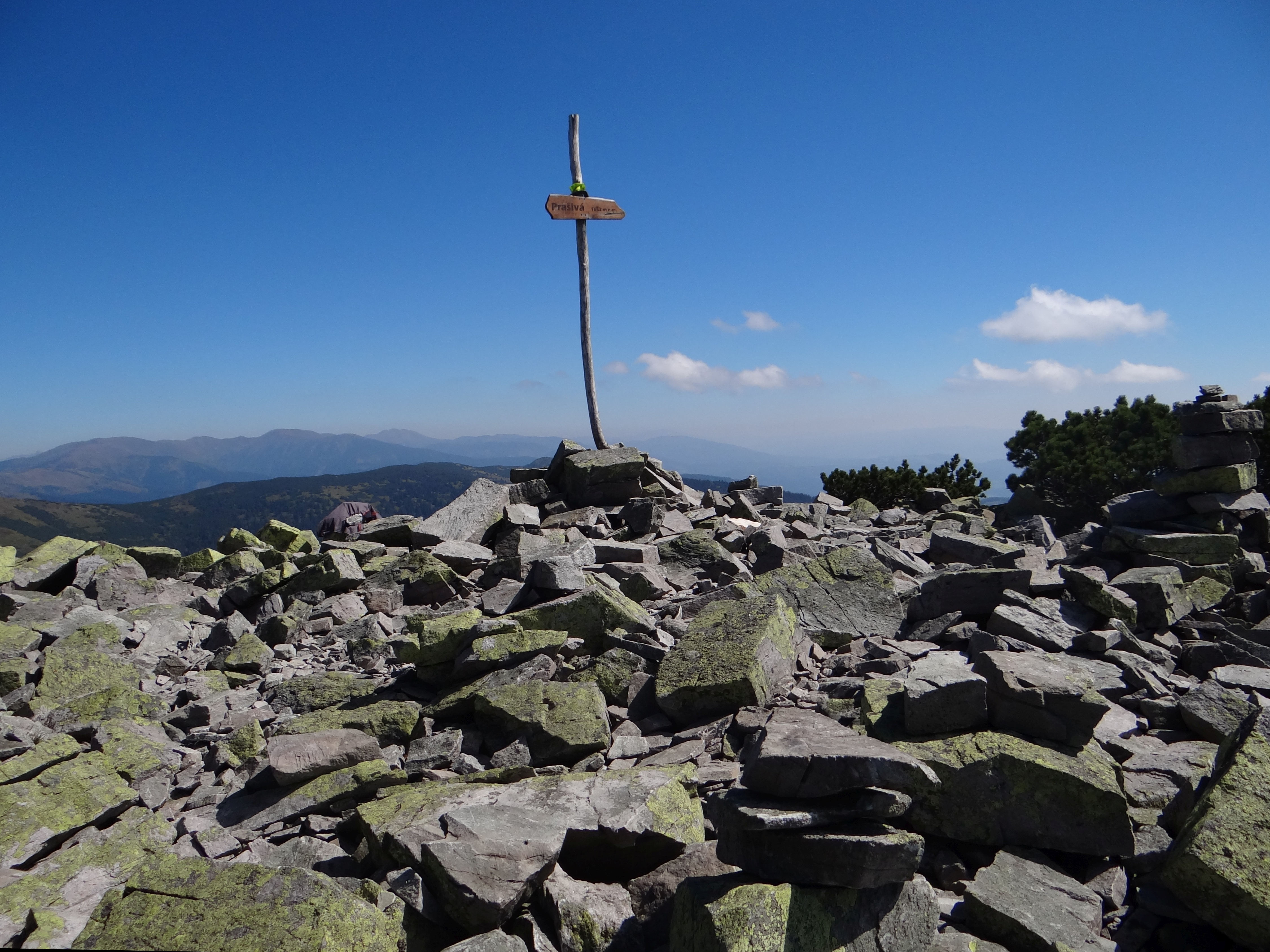 Prašivá